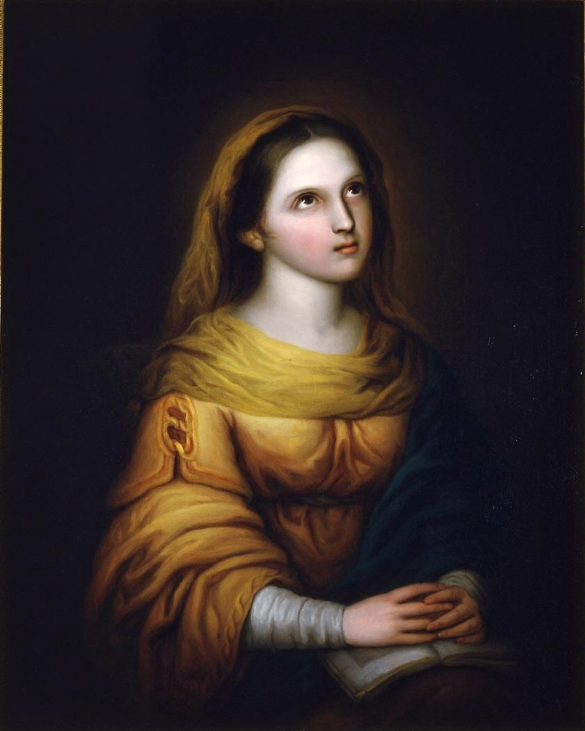 La obra representa a la Virgen María, madre de Jesucristo, en actitud orante.